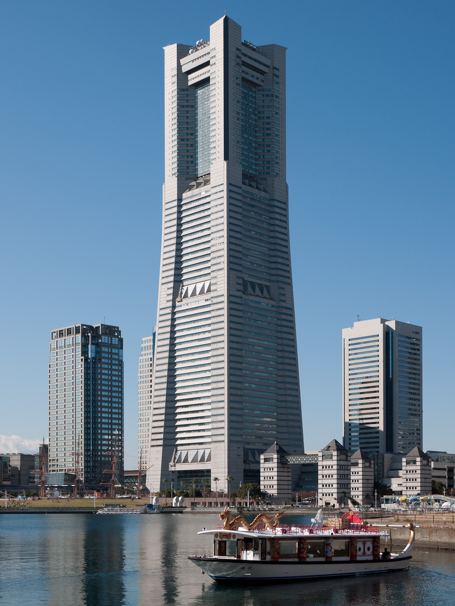 横浜ランドマークタワー。